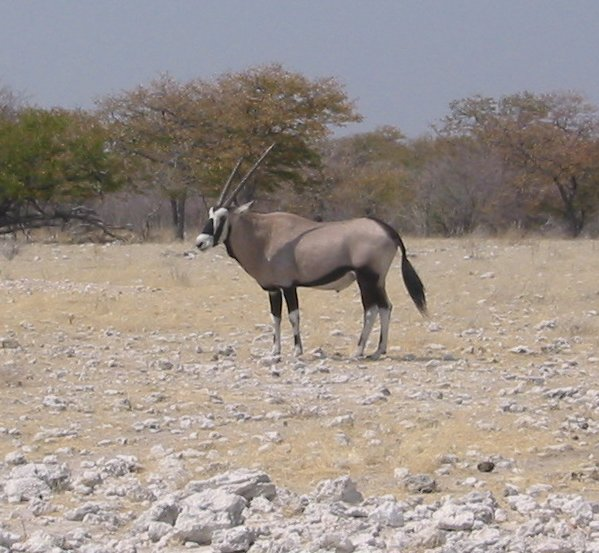 Oryx gazella, fotografiert im August 2004 in freier Wildbahn in Namibia Lizenz: Gemeinfrei, von Freddy Weber (für Benutzer:Roger Zenner)